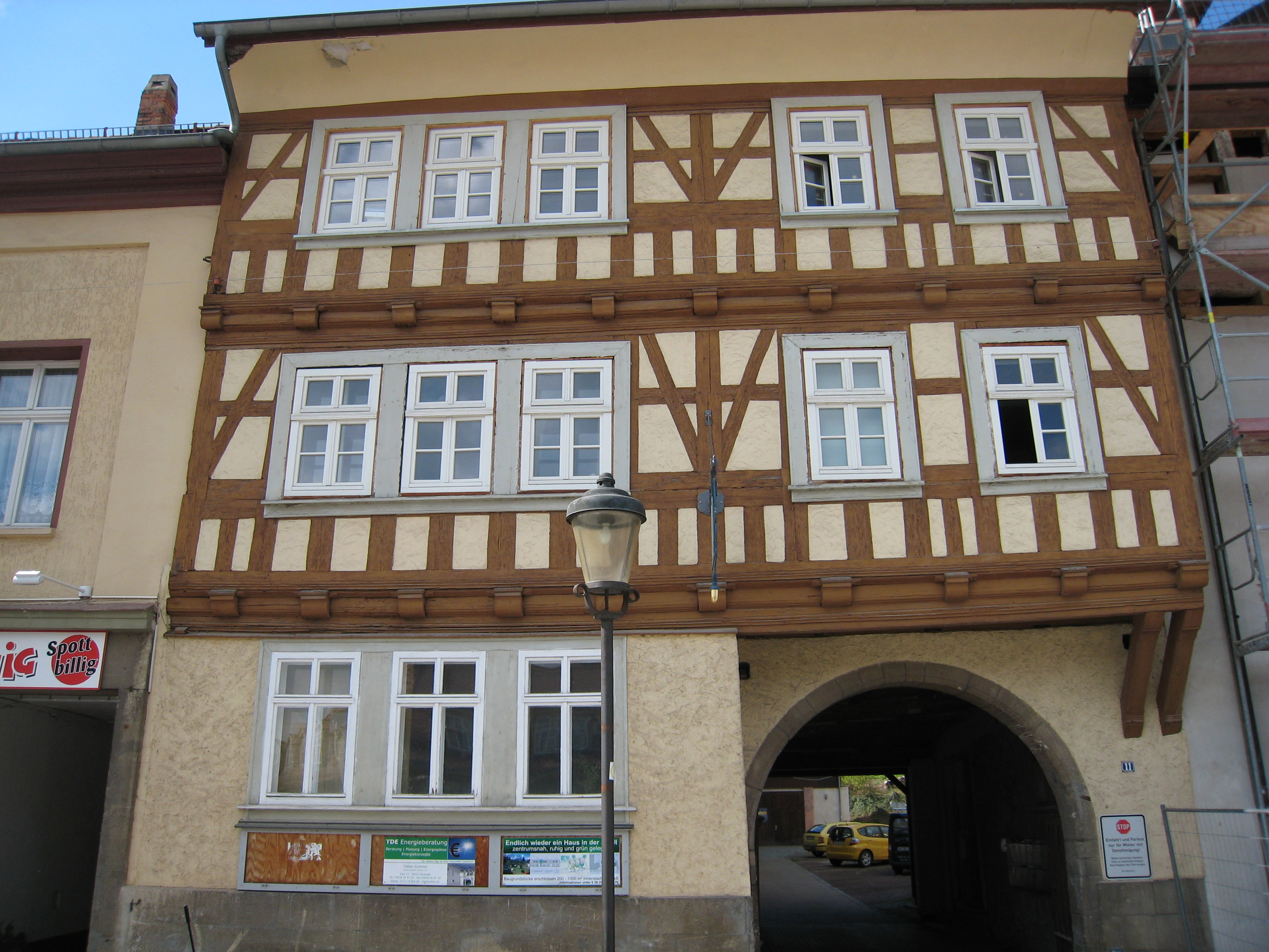 Das Fachwerkhaus Zum Römer in Arnstadt, Ried 9.